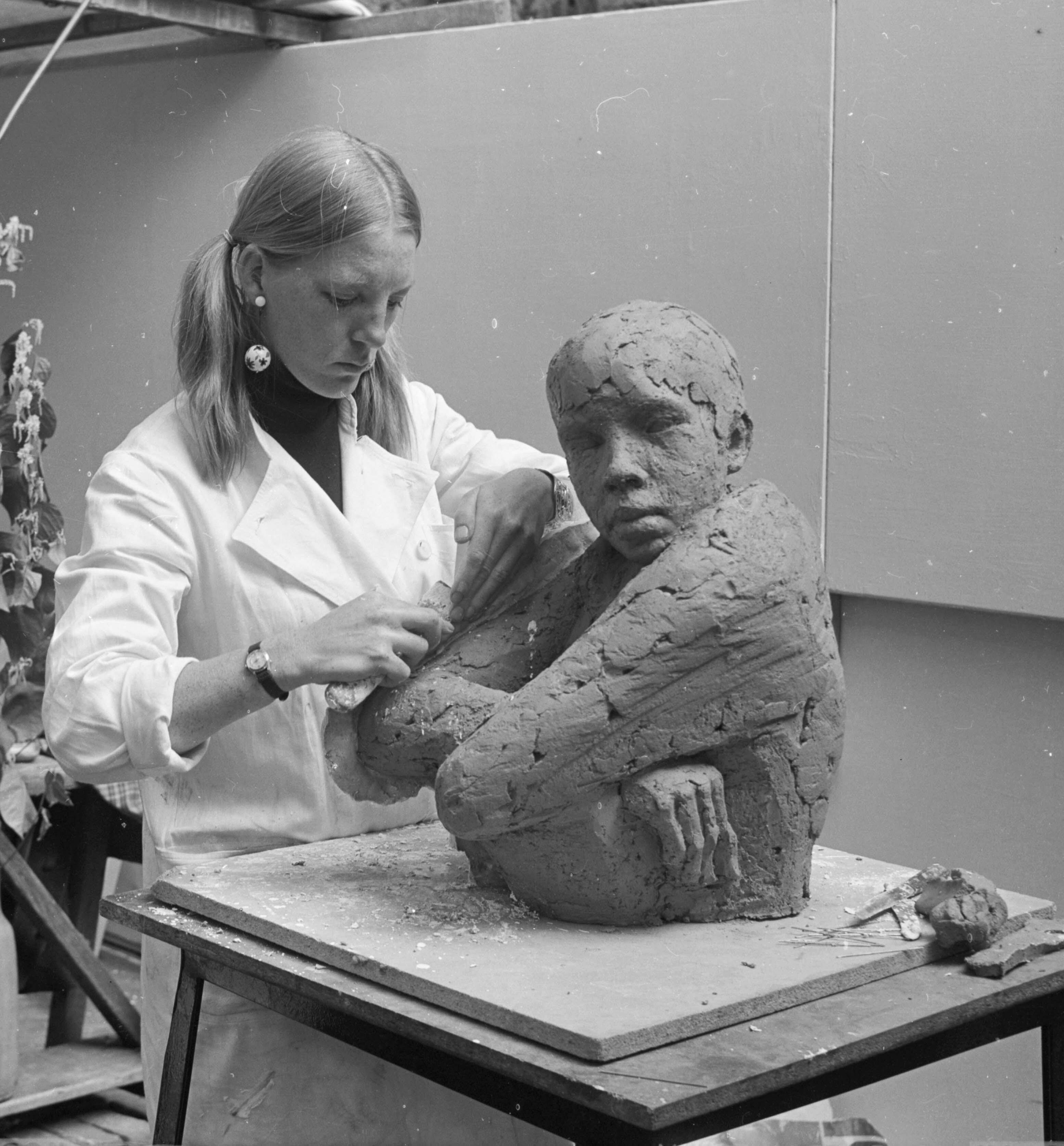 Beeldhouwster Annet Haring op de kunstmarkt op het Janskerkhof te Utrecht in 1966.